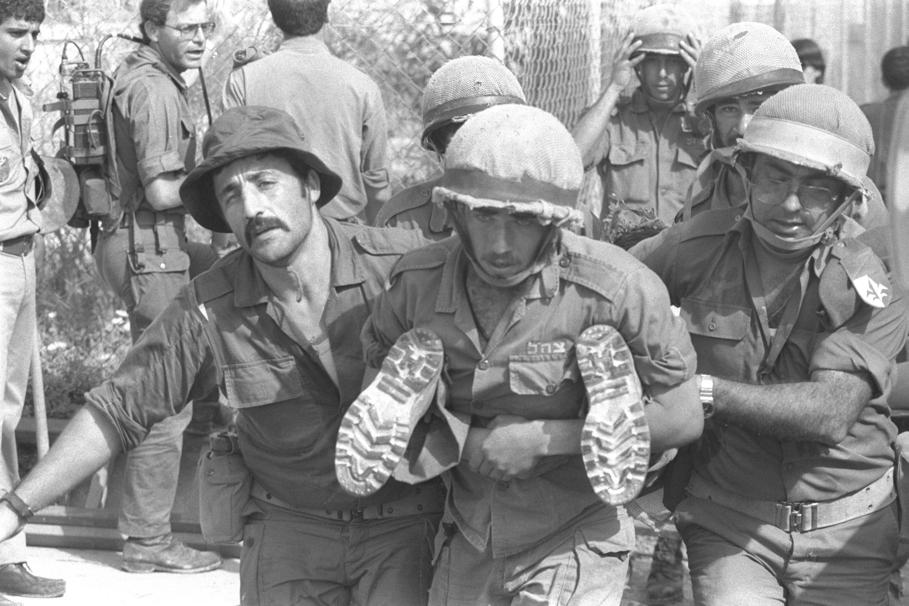 Soldiers carrying a stuggling settler to the evacuation center in yamit. פינוי העיר ימית בצפון סיני לקראת החזרת המקום לידי מצרים במסגרת הסכמי השלום בין שתי המדינות. חיילי צה"ל נקראו לפנות את המתנגדים לפינוי. בצילום, חיילים נושאים את אחד ממתנגדי הפינוי למרכז הפינוי בעיר.